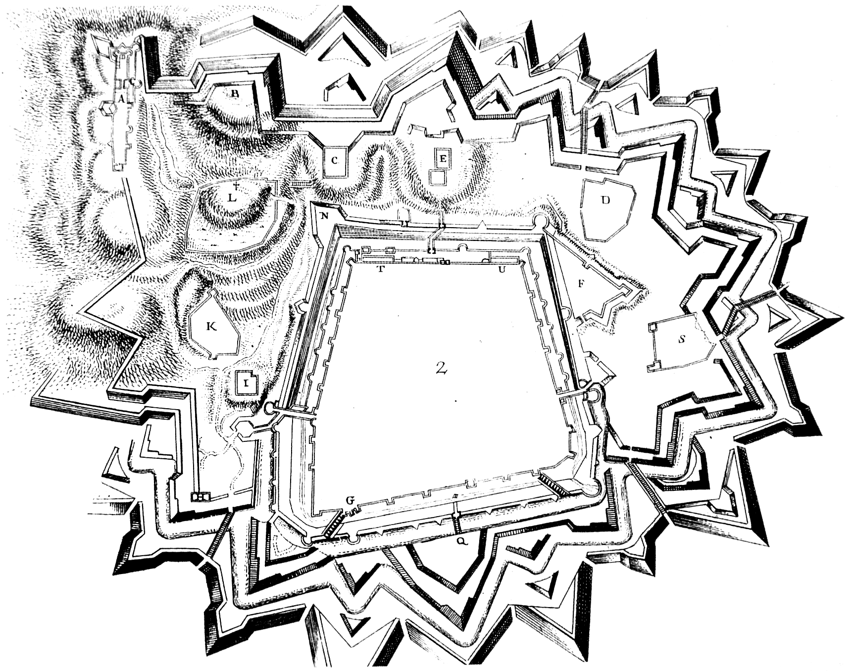 План фортифікацій львівських передмість Яна Беренса 1674 року.